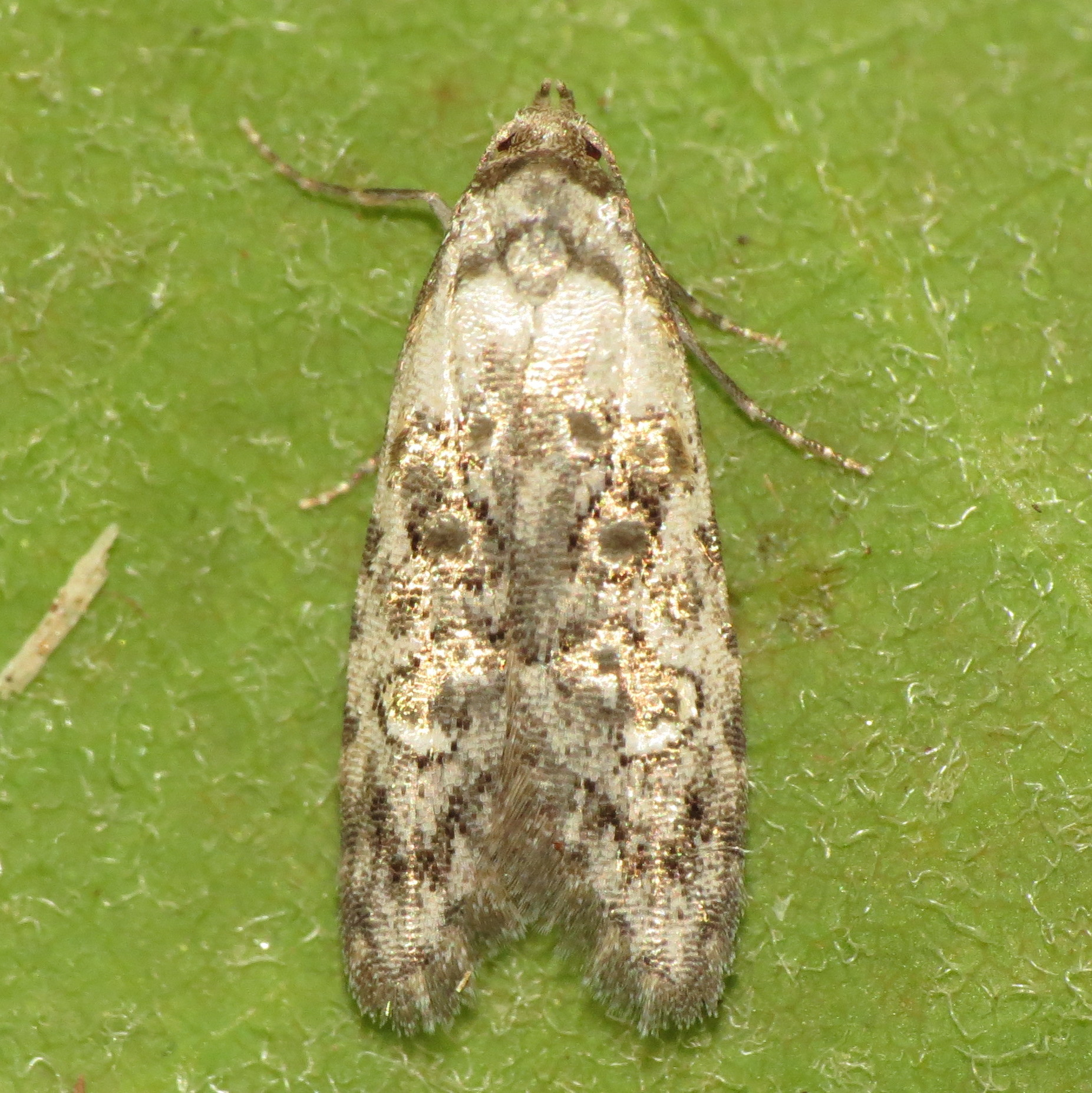 Searsmont, Maine - 6/4/14